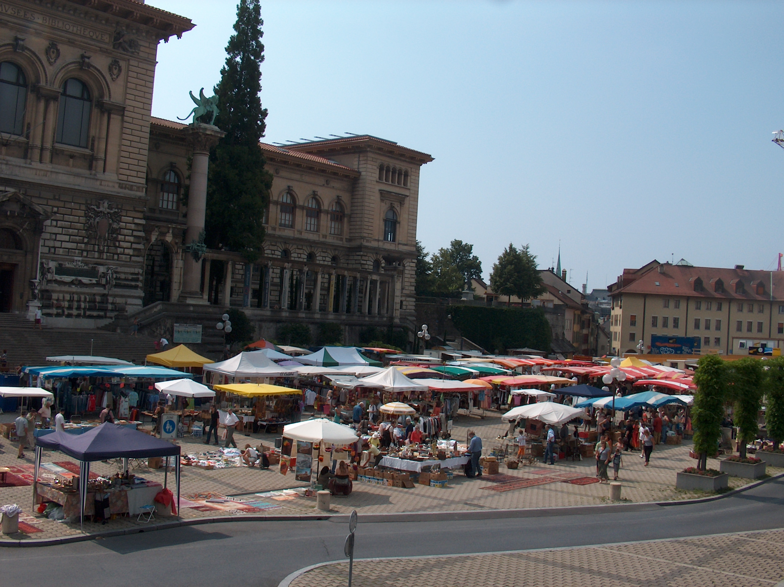 Place de la Riponne à Lausanne et palais de Rumine Infos: jour de marché (samedi) Category: Category:Lausanne